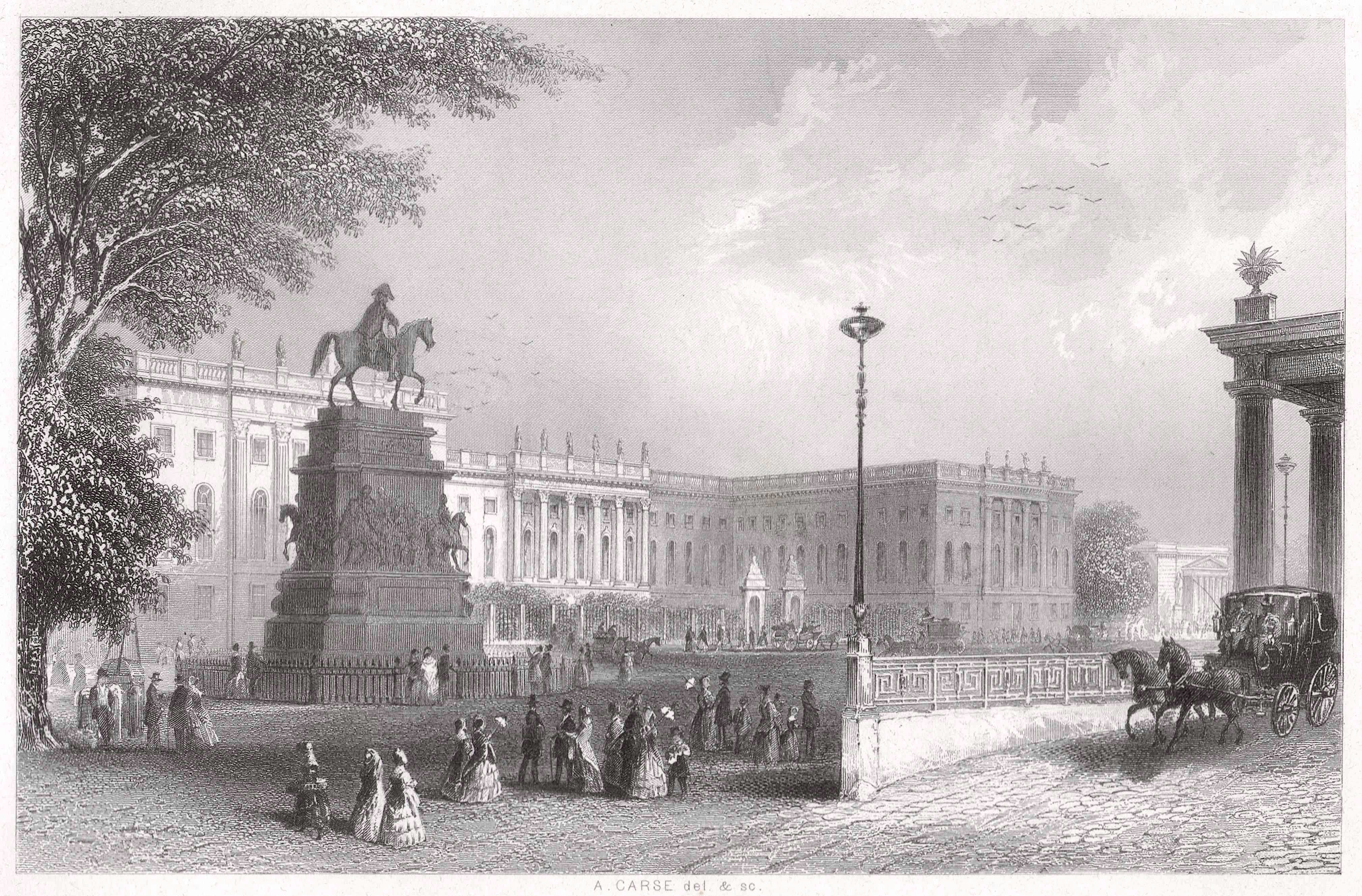 Berlin, University around 1850, featuring Reiterstandbild Friedrichs des Großen